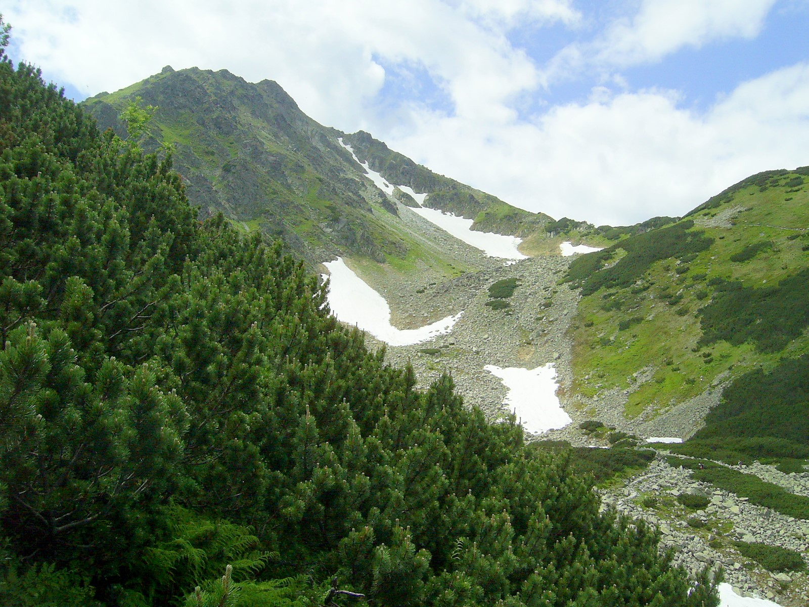 Opalony Wierch nad Świstówką Roztocką